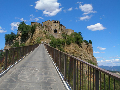 Cività di Bagnoregio-Latium-Italie